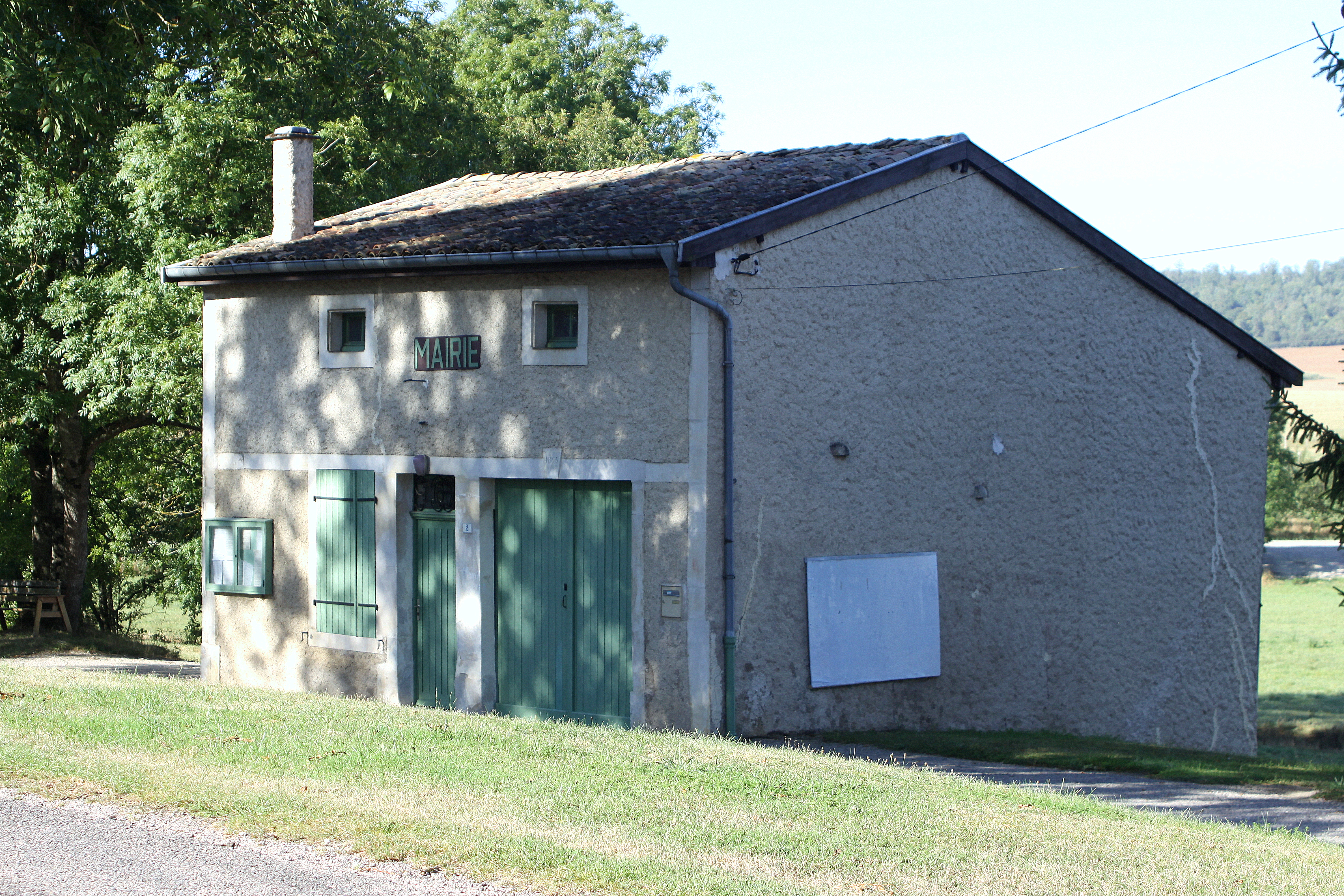 D'Märei vu Montbras